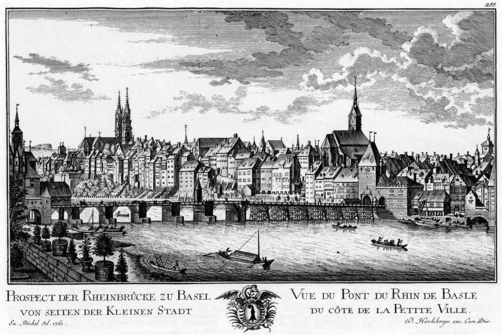 Ansicht der Stadt Basel 1761. Blatt 255 in der Topographie der Eidgenossenschaft, zweite Lieferung 1785–1762/63. Stich von David Herrliberger nach einer Zeichnung von Emanuel Büchel